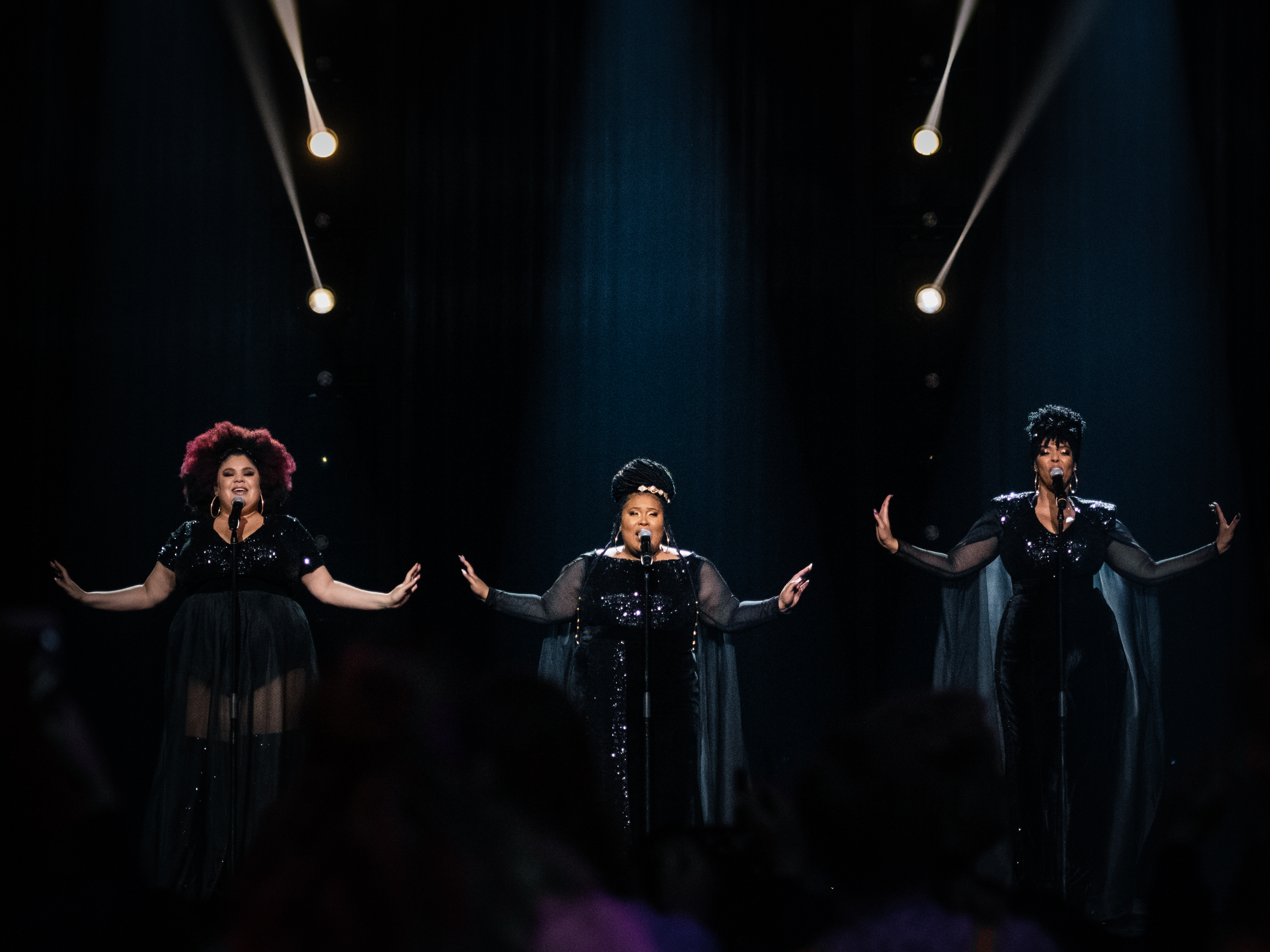 Loulou Lamotte, Ash Haynes och Dinah Yonas Manna uppträder vid finalen i Melodifestivalen 2020